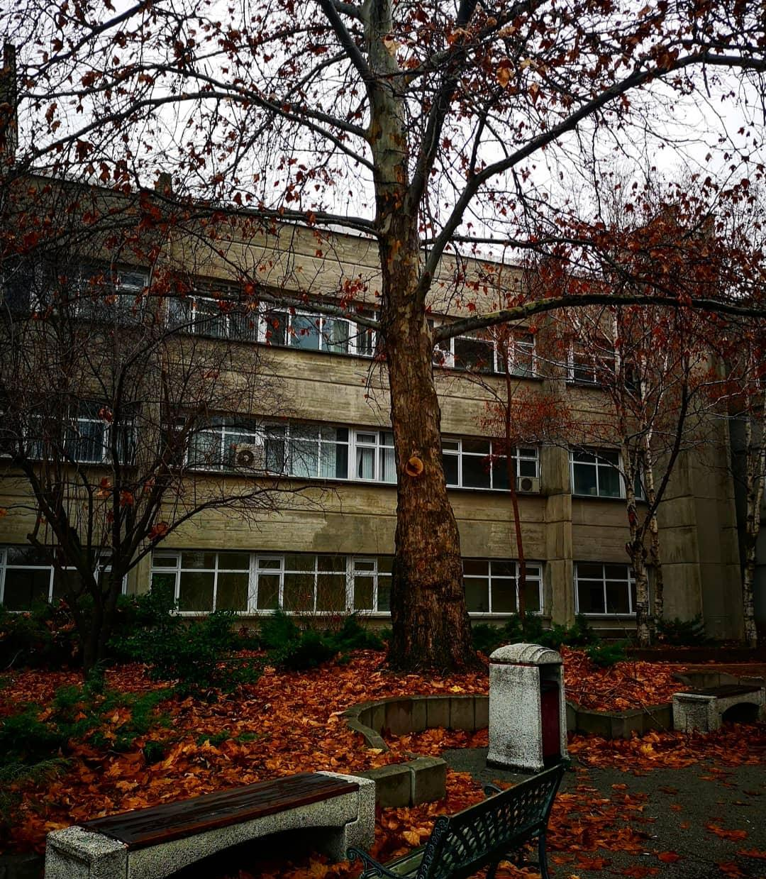 Hacettepe Üniversitesi Beytepe Kampüsü